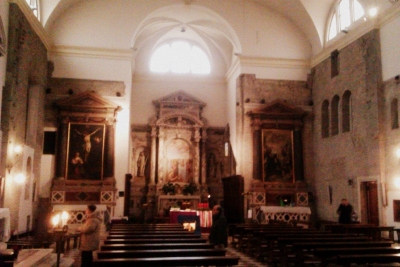 Chiesa di Ognissanti a Padova.